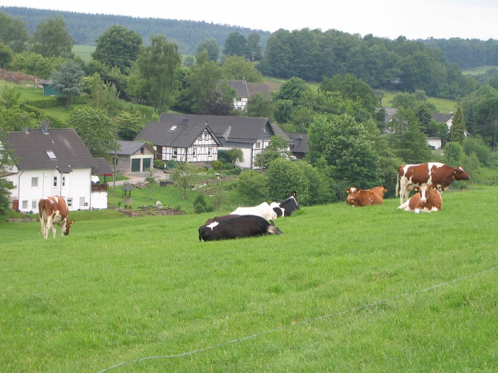 Rot- und Schwarzbuntes Rindvieh auf einer Wiese bei Lindlar-Voßbruch